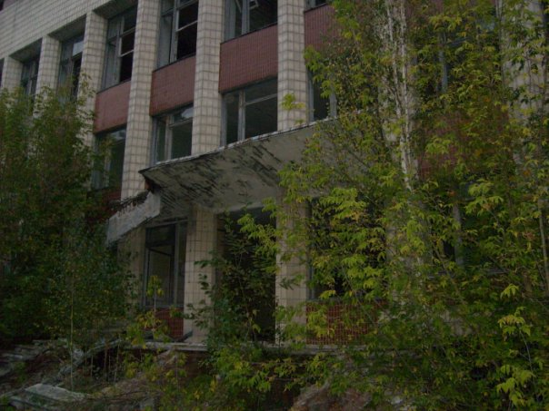 Руины Полесского райисполкома, 2009 год.